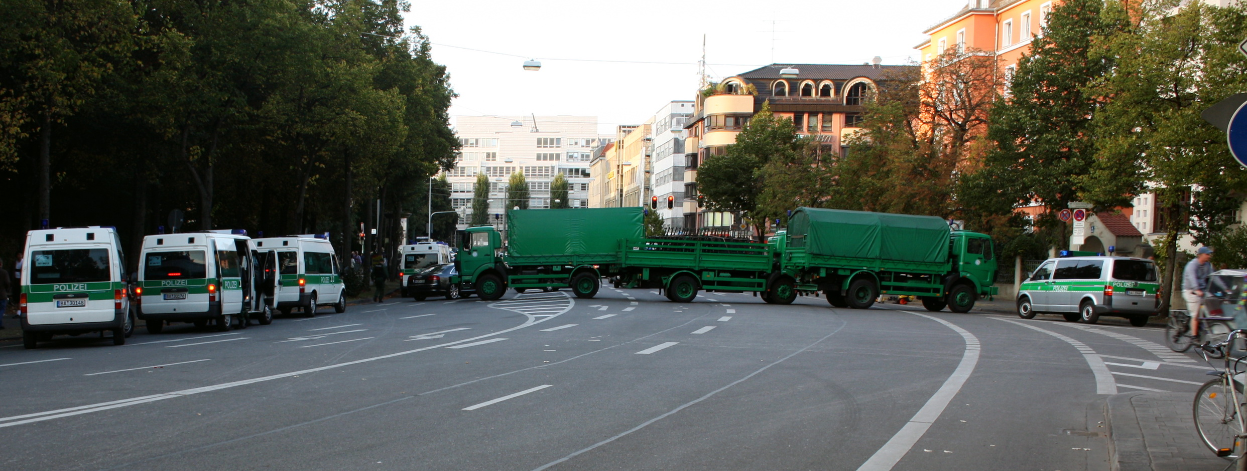 Absperrung der Polizei auf der Zufahrt zum Oktoberfest München. Hier finden Zufahrtskontrollen statt. Fahrzeuge werden durchsucht.